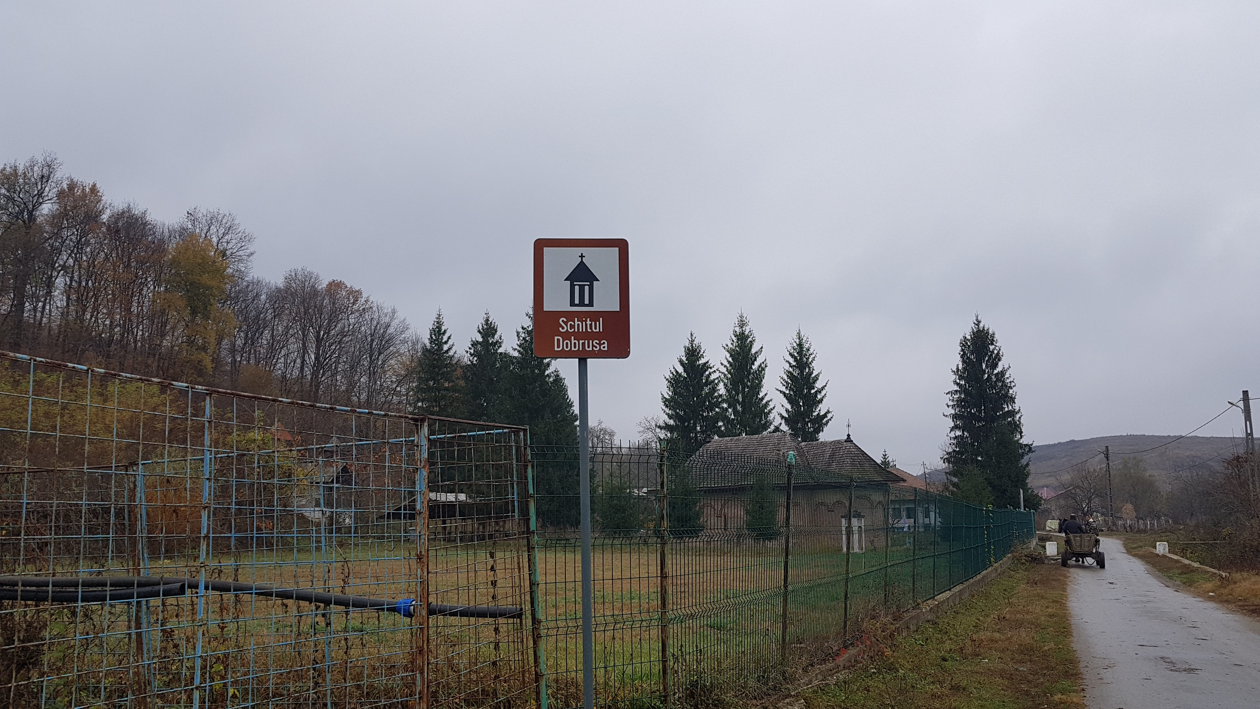 Biserica „Intrarea în Biserică” a fostului schit Dobrușa